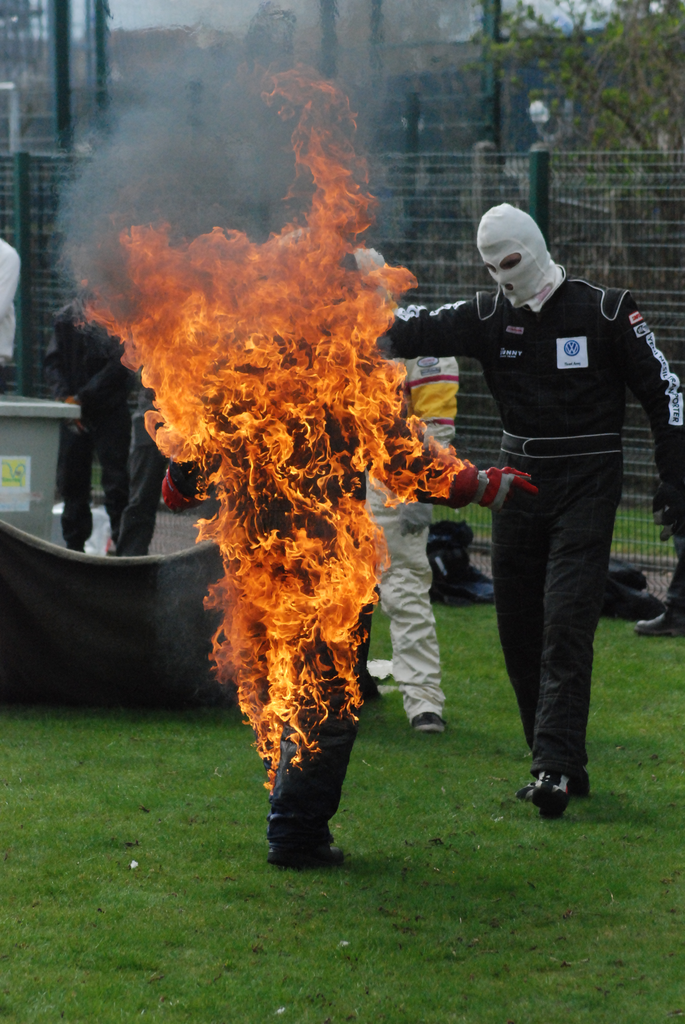 Torche humaine réalisée par un élève de l'école Action Training Productions et entourée par des professionnels.